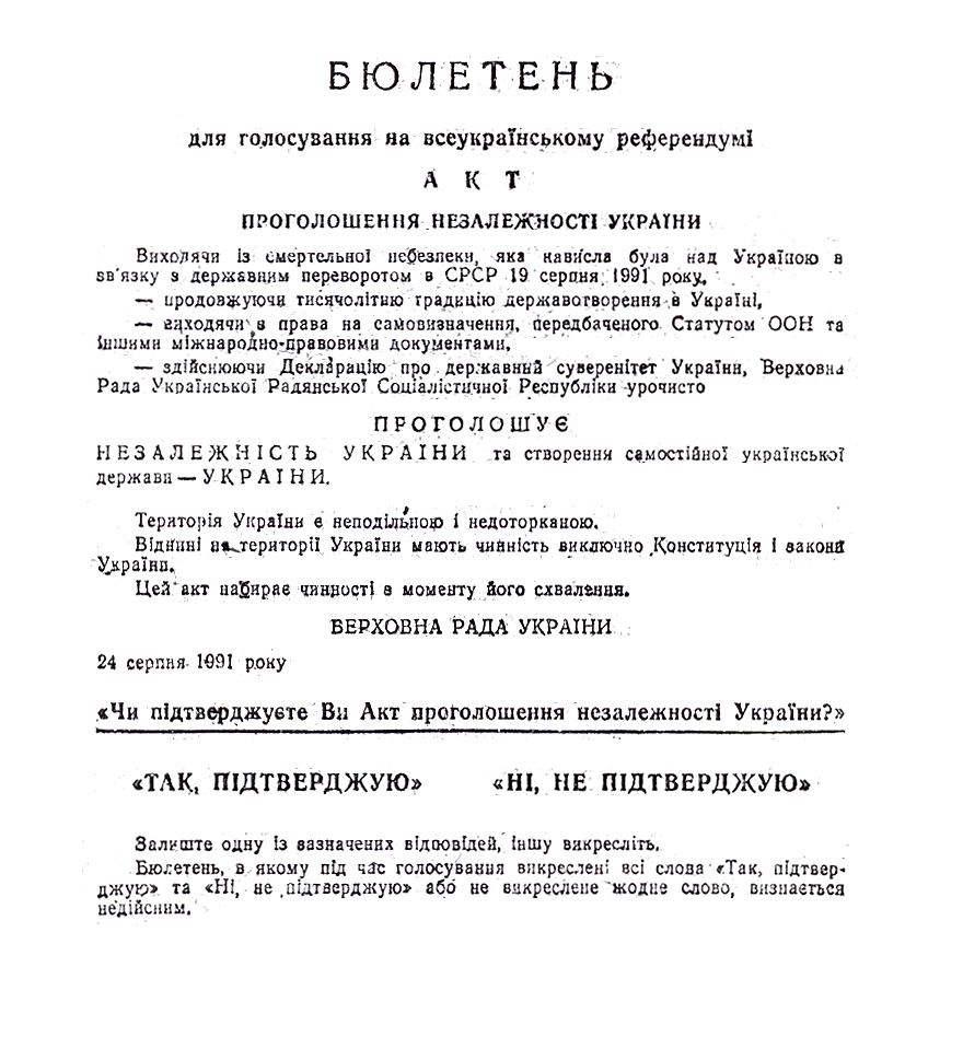 Всеукраїнський референдум 1991 (Бюлетень)